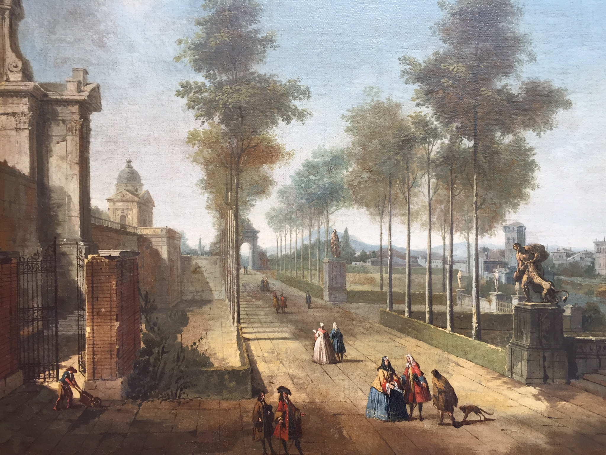 Francesco Battaglioli, Gasparo Diziani, A Tree Lined Avenue with Figures